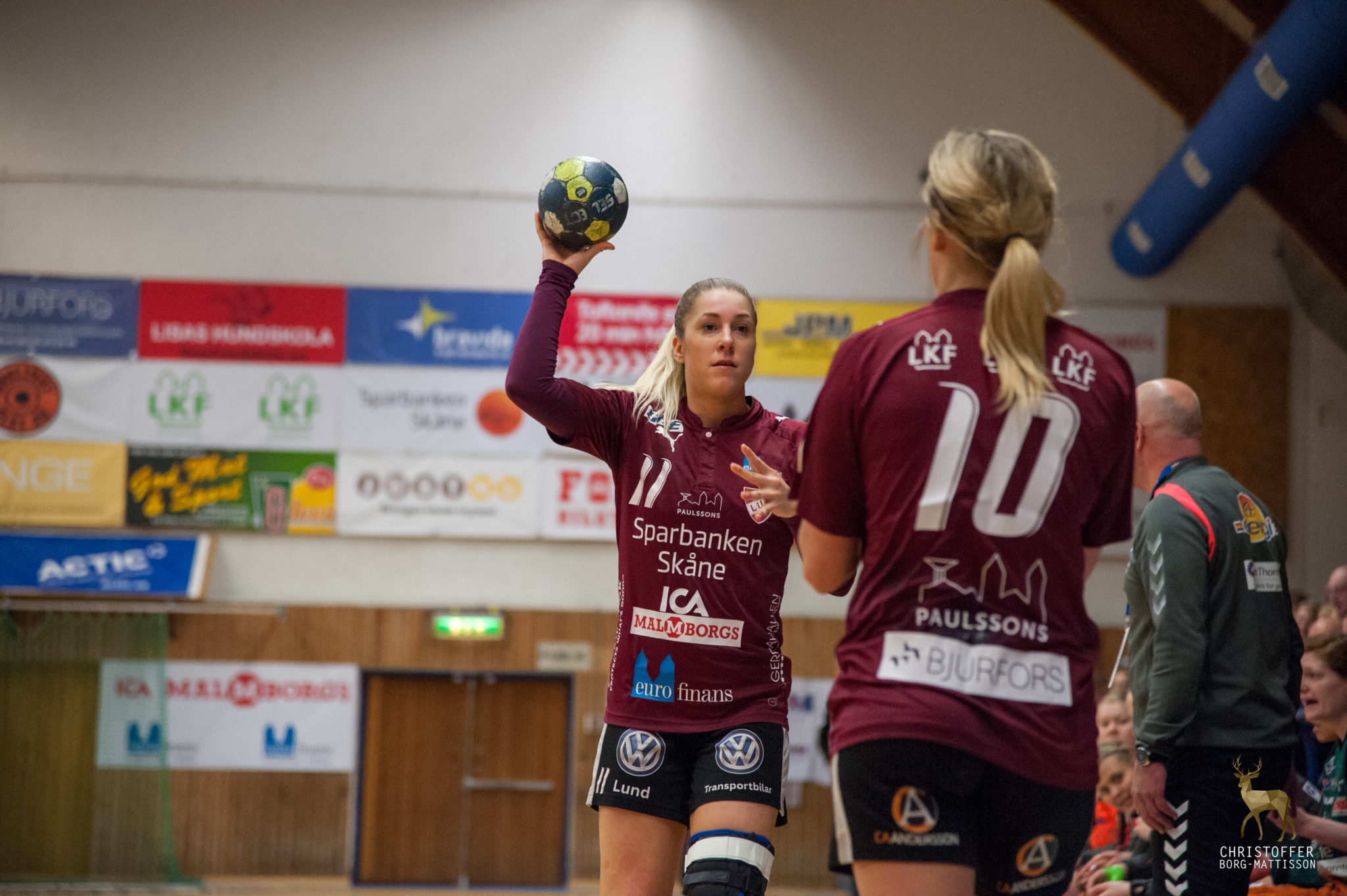 Melissa Petrén (med bollen) i matchen mellan LUGI och Kristianstad Handboll i SHE.